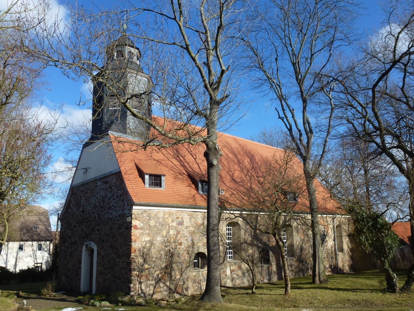 Romanische Wehrkirche in Holzweißig